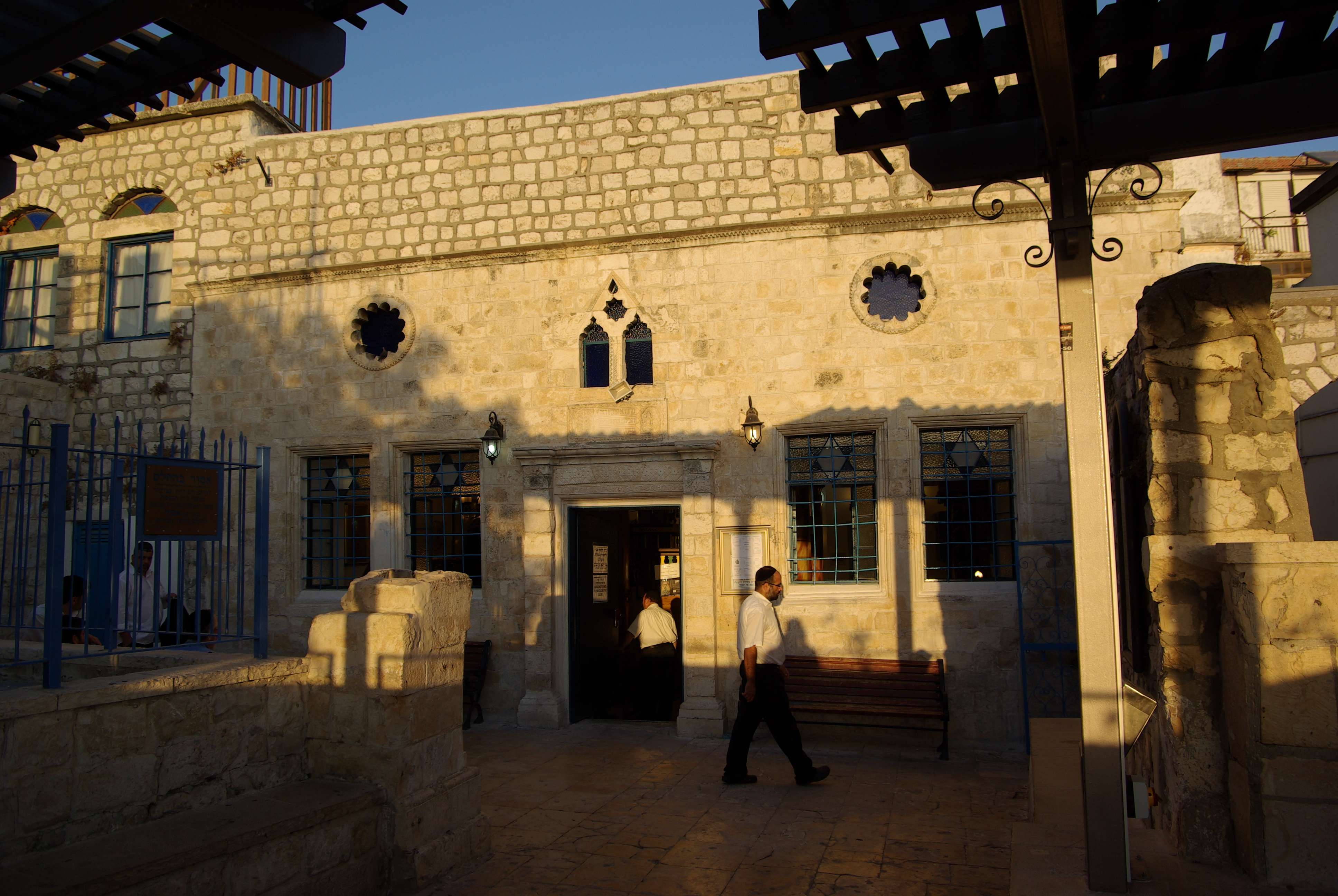 Synagoge in Safed